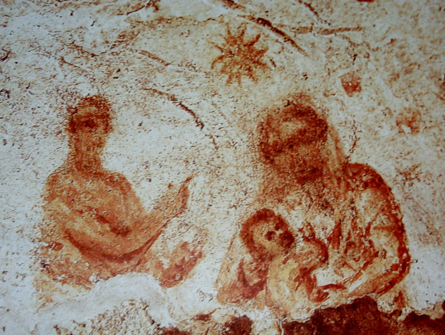 Natività Catacombe Priscilla Roma